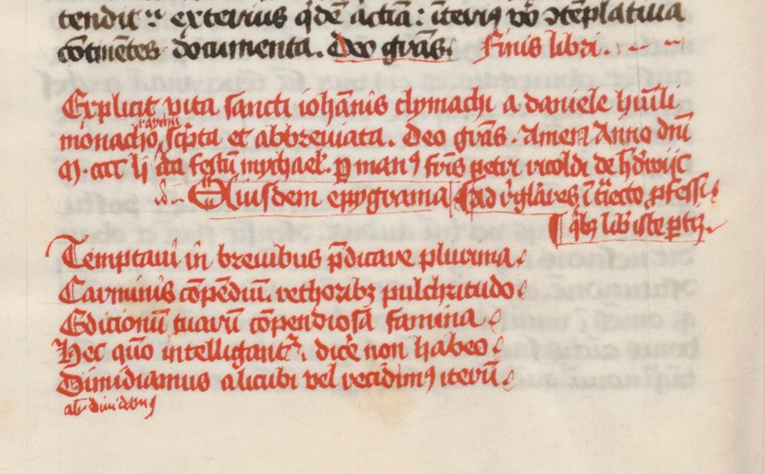 Colofon met de datum waarop het handschrift klaar was, 1451, rond het feest van Sint Michael (29 september) en de naam van de schrijver, Petrus Ricoldus de Harderwijc, werkzaam bij de regulieren in Utrecht. Hij voegt ook een gedicht toe.